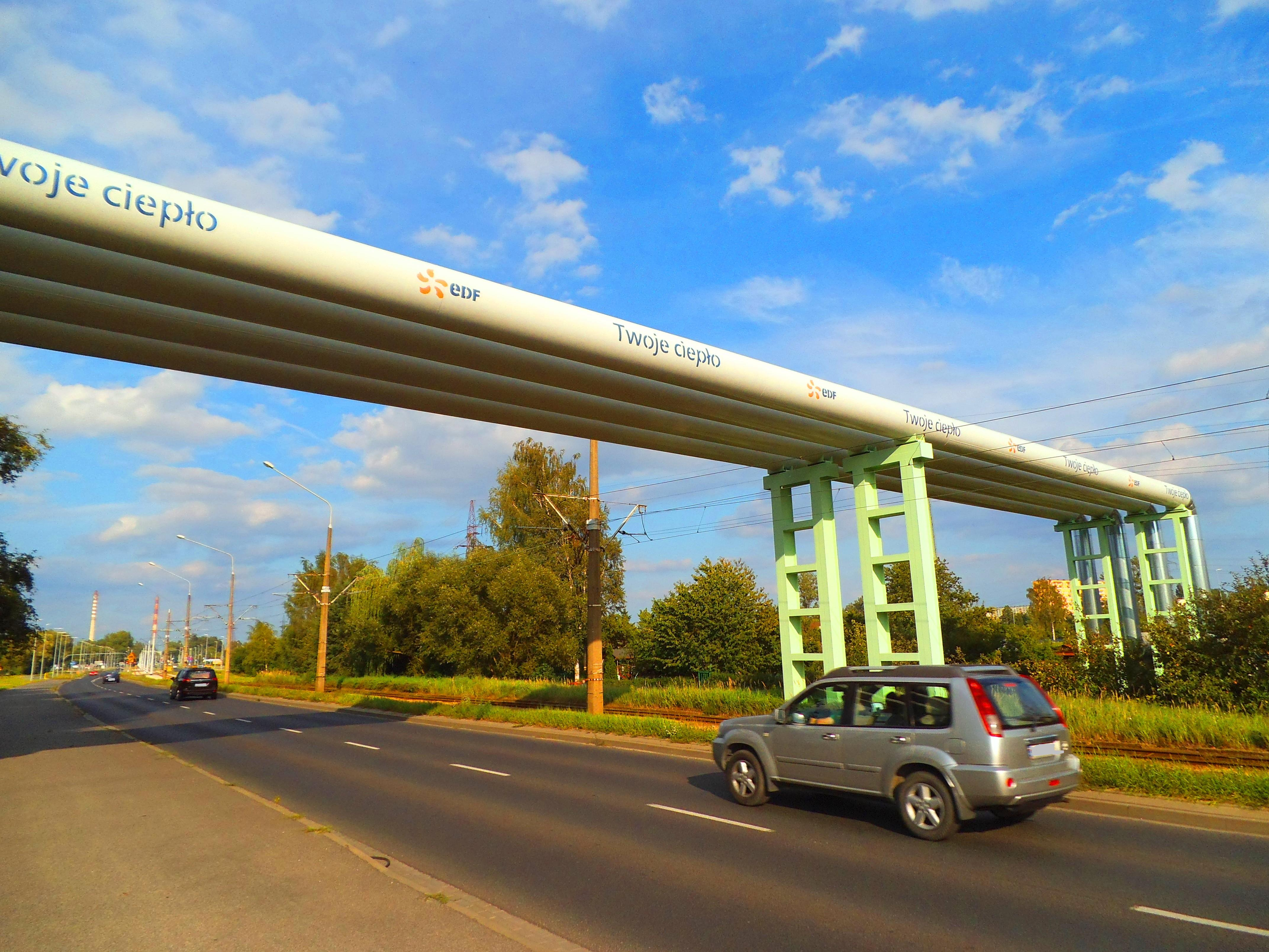 Fragment sieci ciepłowniczej w Toruniu11